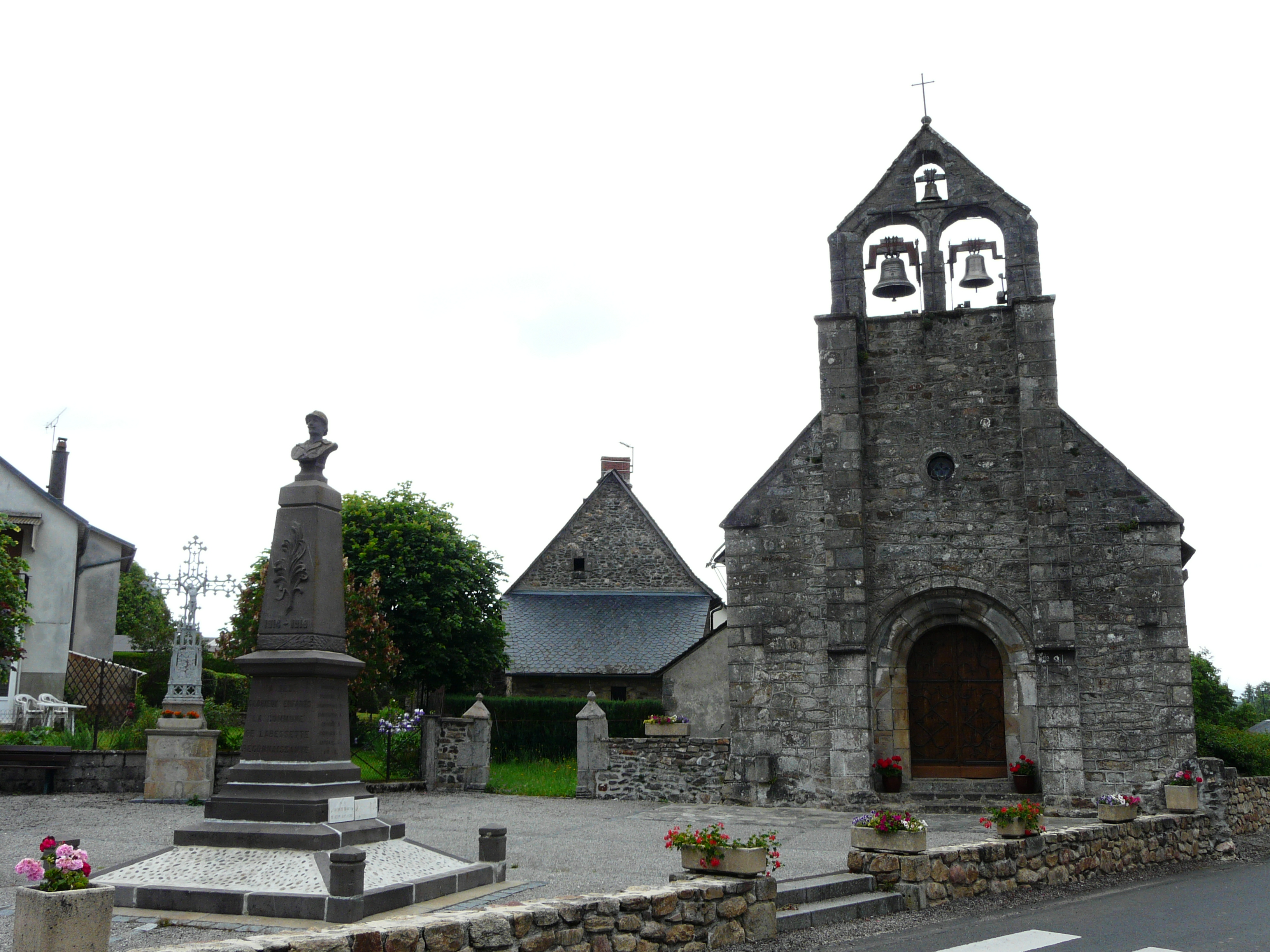 La place de l'église, Labessette, Puy-de-Dôme, France.